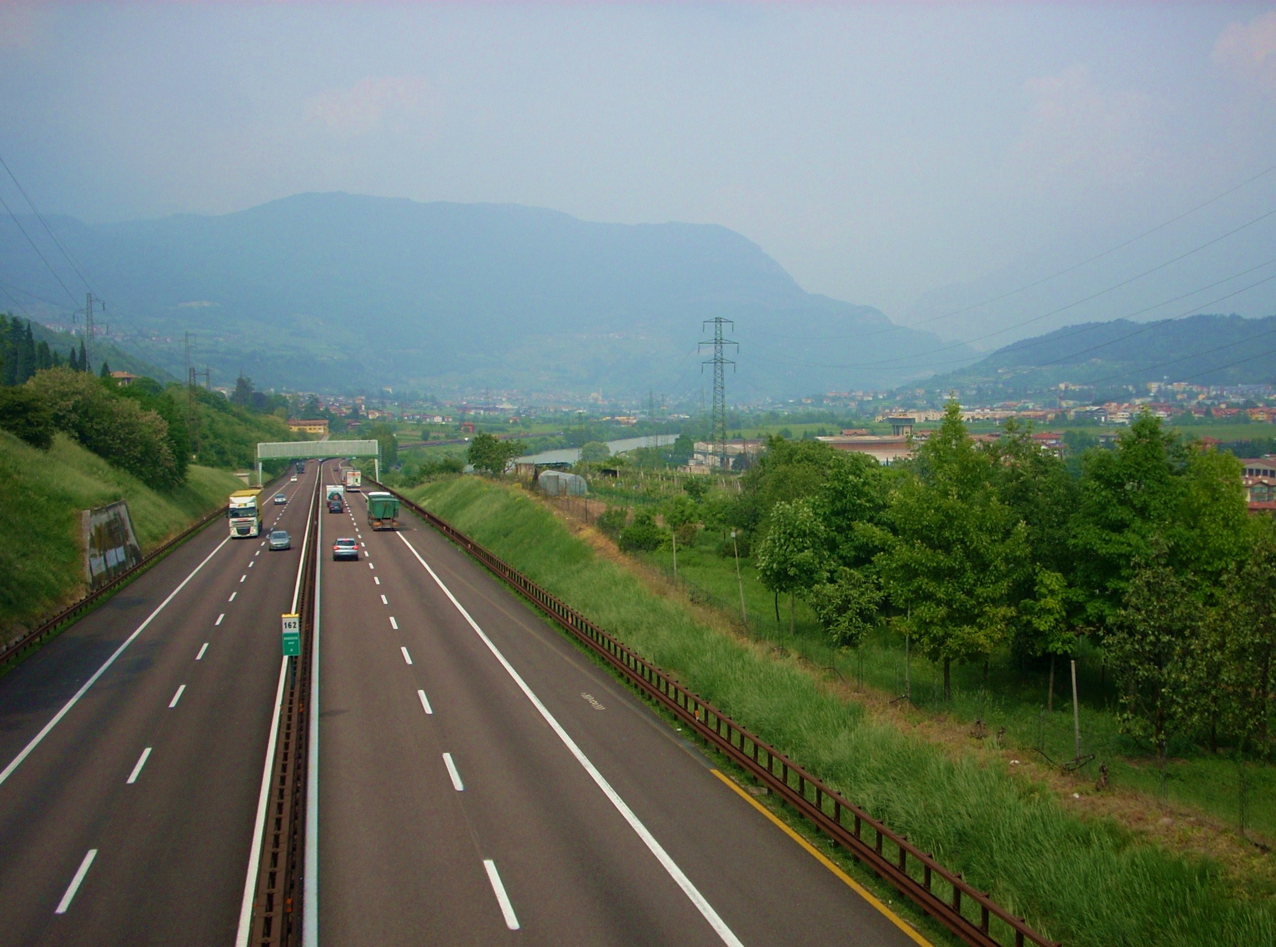 L'autostrada del Brennero nel tratto compreso fra i caselli "Rovereto Nord" - "Rovereto sud - Lago di Garda nord"